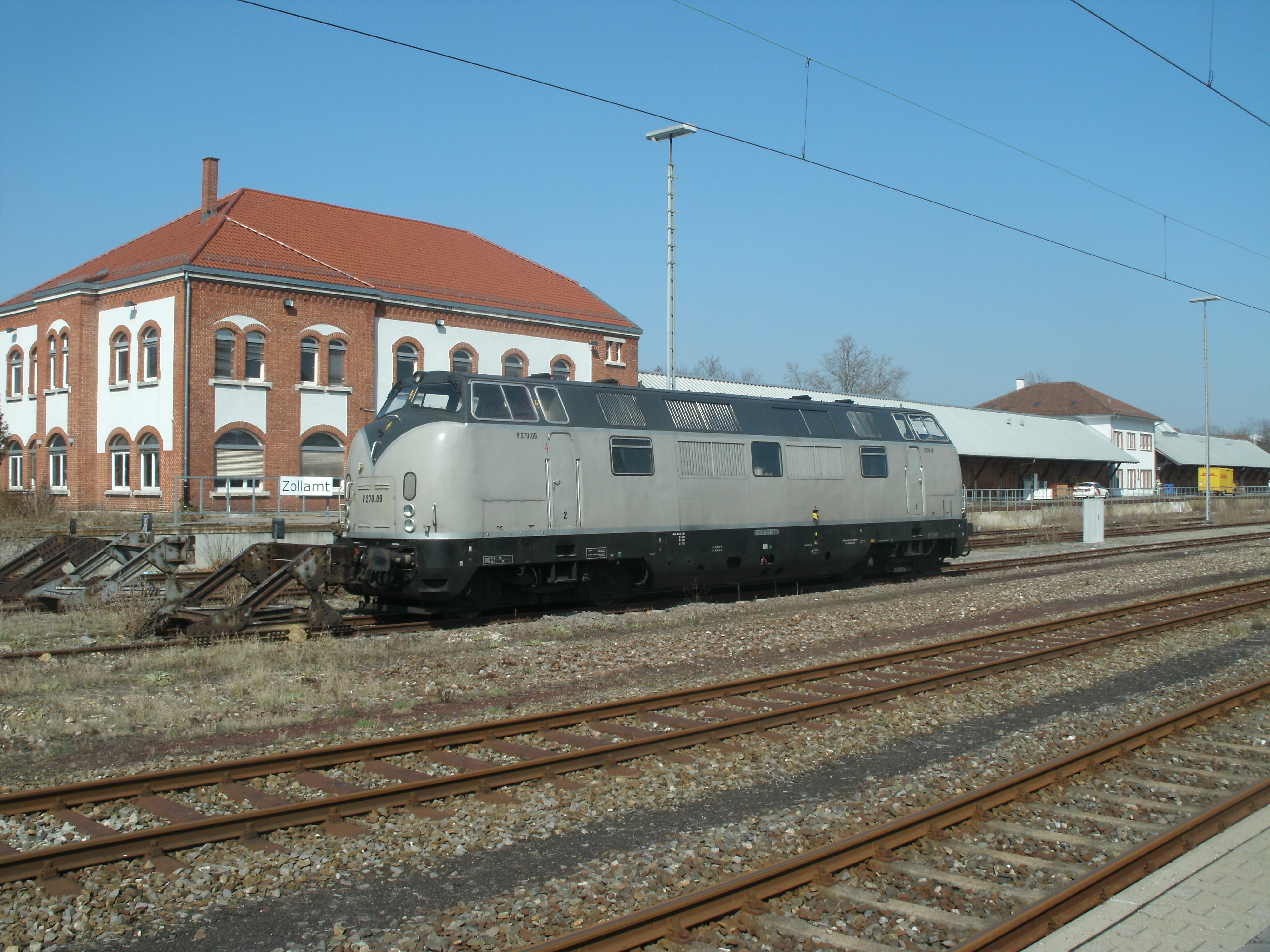 V270.09